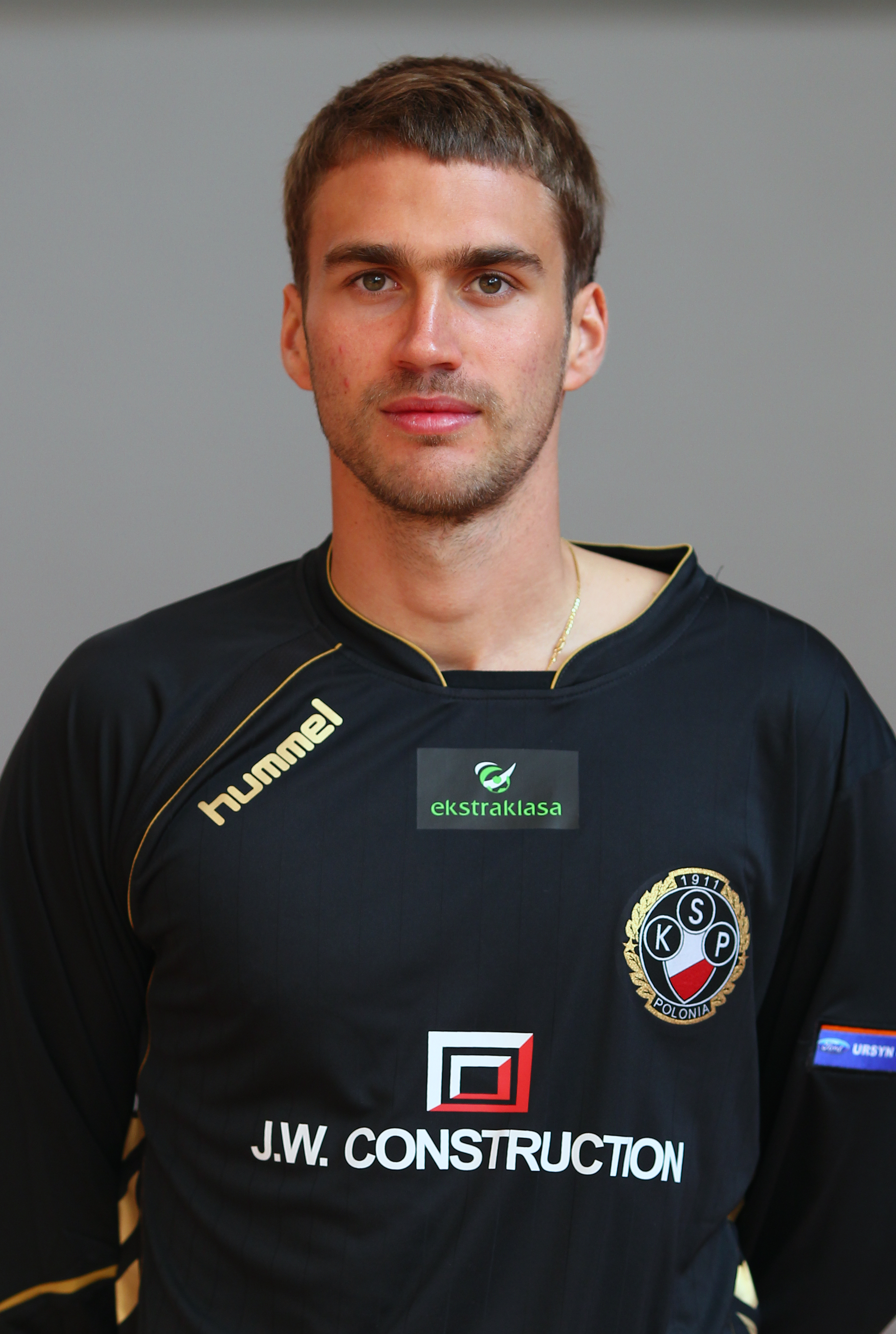 Adam Kokoszka, player of Polonia Warszawa (2011)